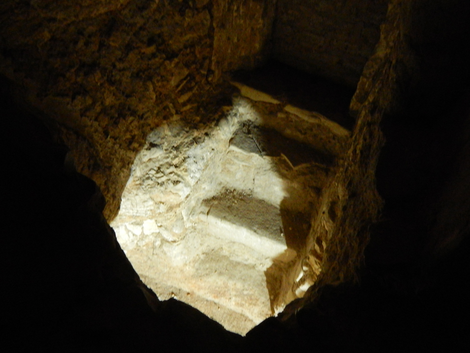 Jerozolima, Grota Pojmania Jezusa, Grota Getsemani